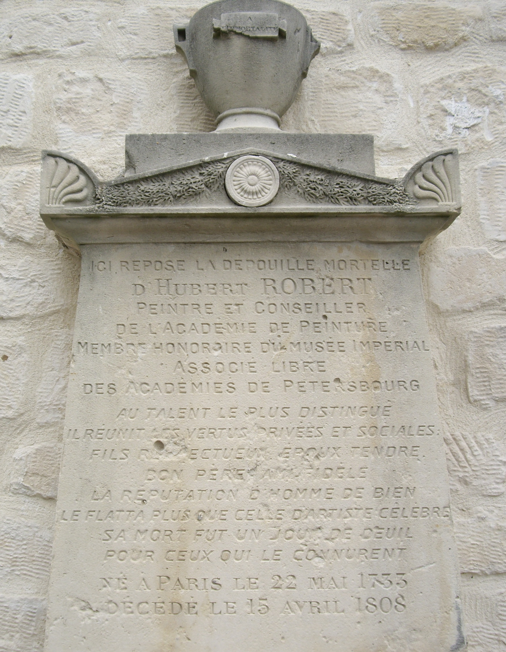 Tombe d'Hubert Robert, cimetière d'Auteuil, division 5. Hubert Robert (1733–1808) Alternative namesBirth name: Robert des RuinesDescription French painter and draughtsman Date of birth/death22 May 173315 April 1808Location of birth/deathParisParisWork locationRome, ParisAuthority control VIAF: 39385770 LCCN: n81128260 GND: 118601482 SELIBR: 208027 BnF: cb11937199b ULAN: 500009558 ISNI: 0000 0000 8117 8839 WorldCat WP-Person